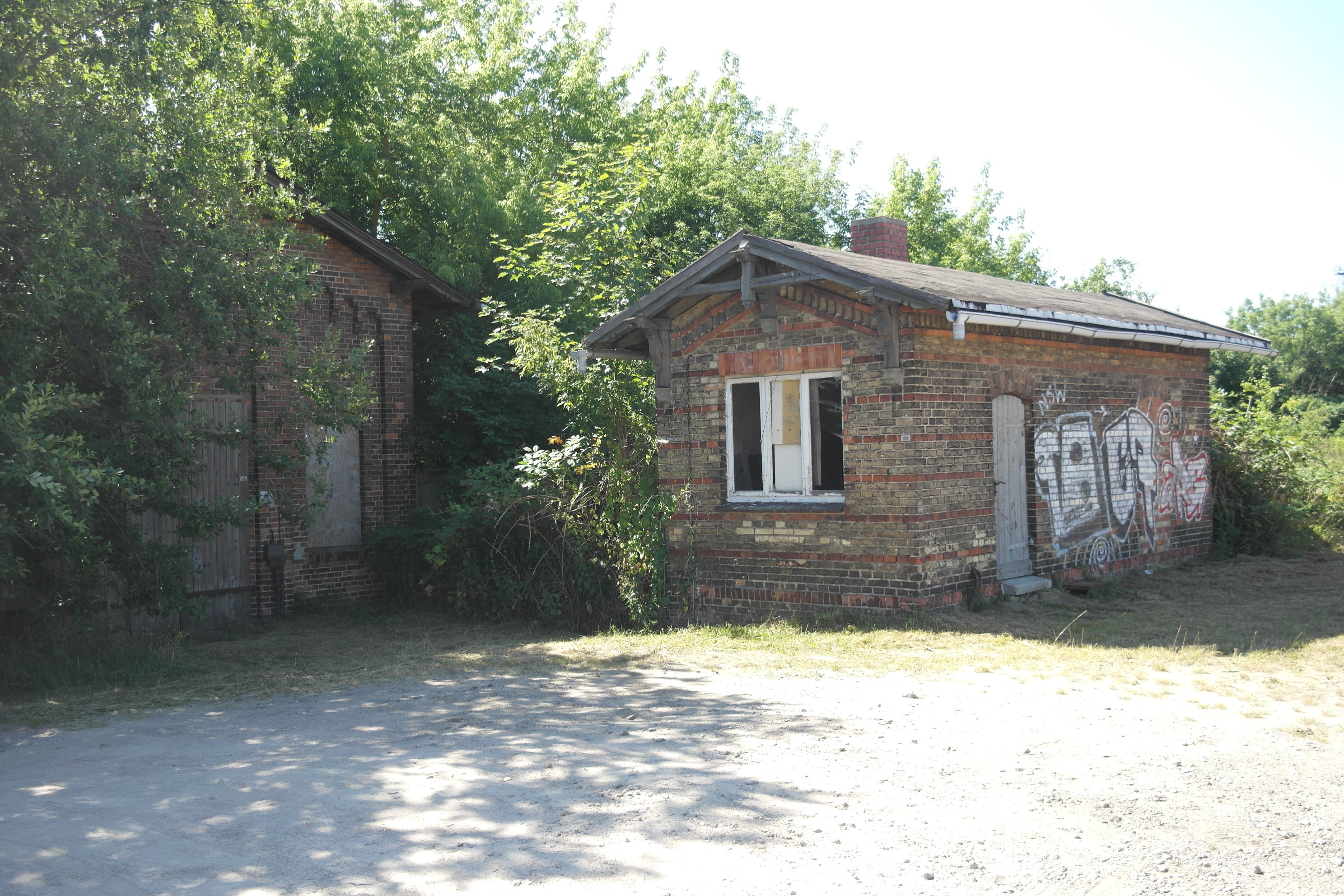 Wolken, denkmalgeschütztes Bahnwärterhaus nördlich des Bahnhofs Bützow